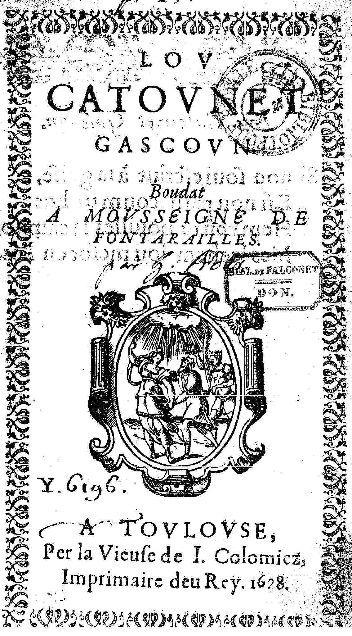 pagina deu Catonet Gascon d'Ader